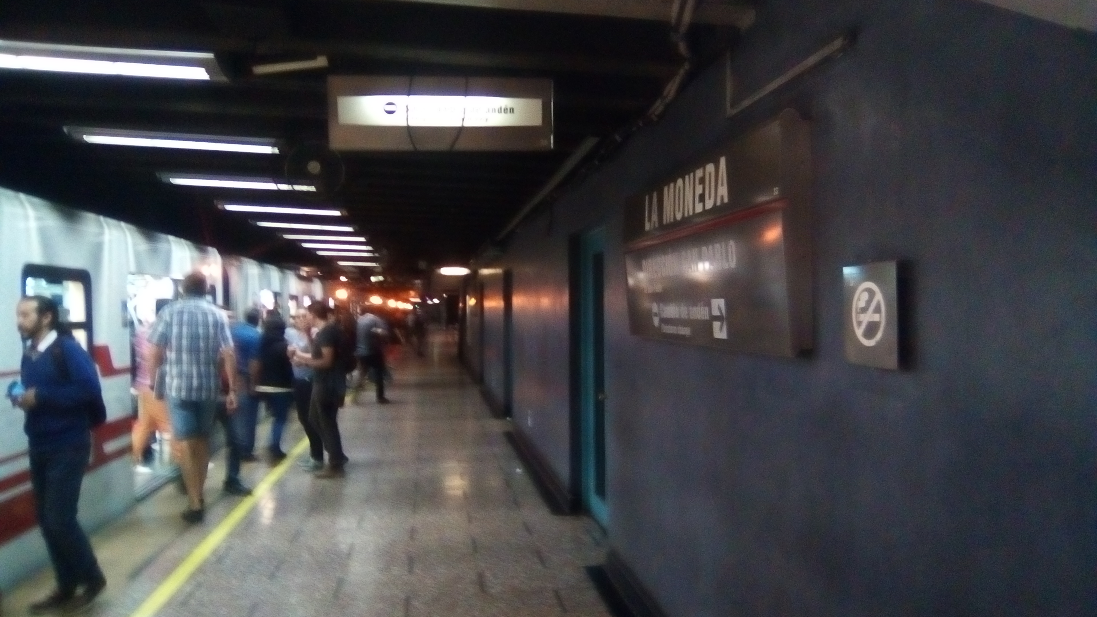 Estación La Moneda